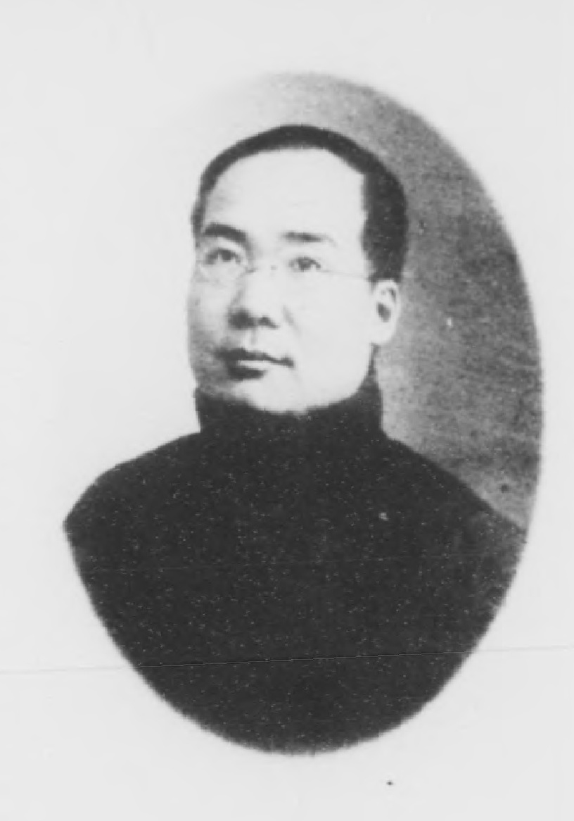 光緒甲辰科進士小像